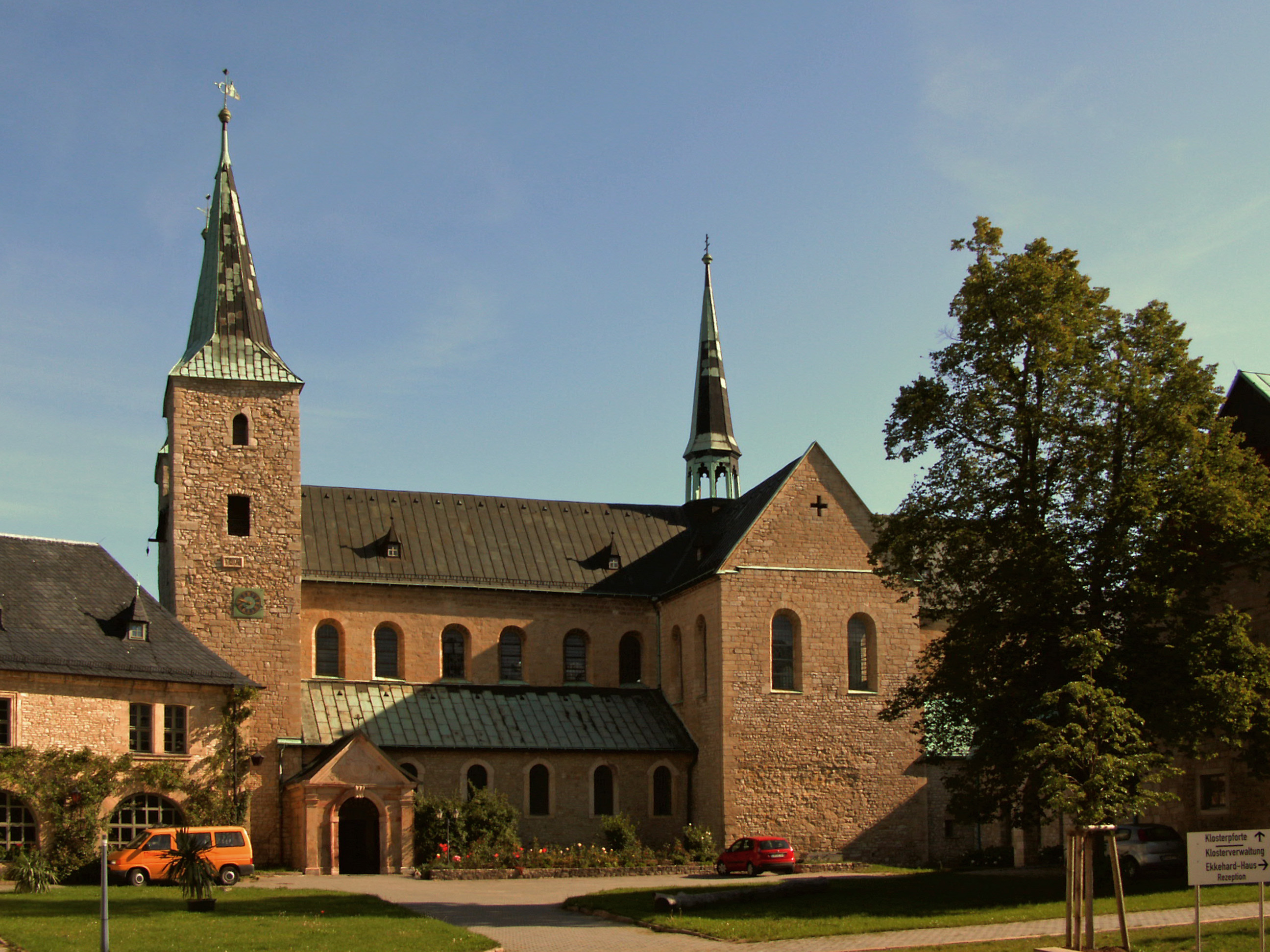 Katholische Kirche auf der Huysburg